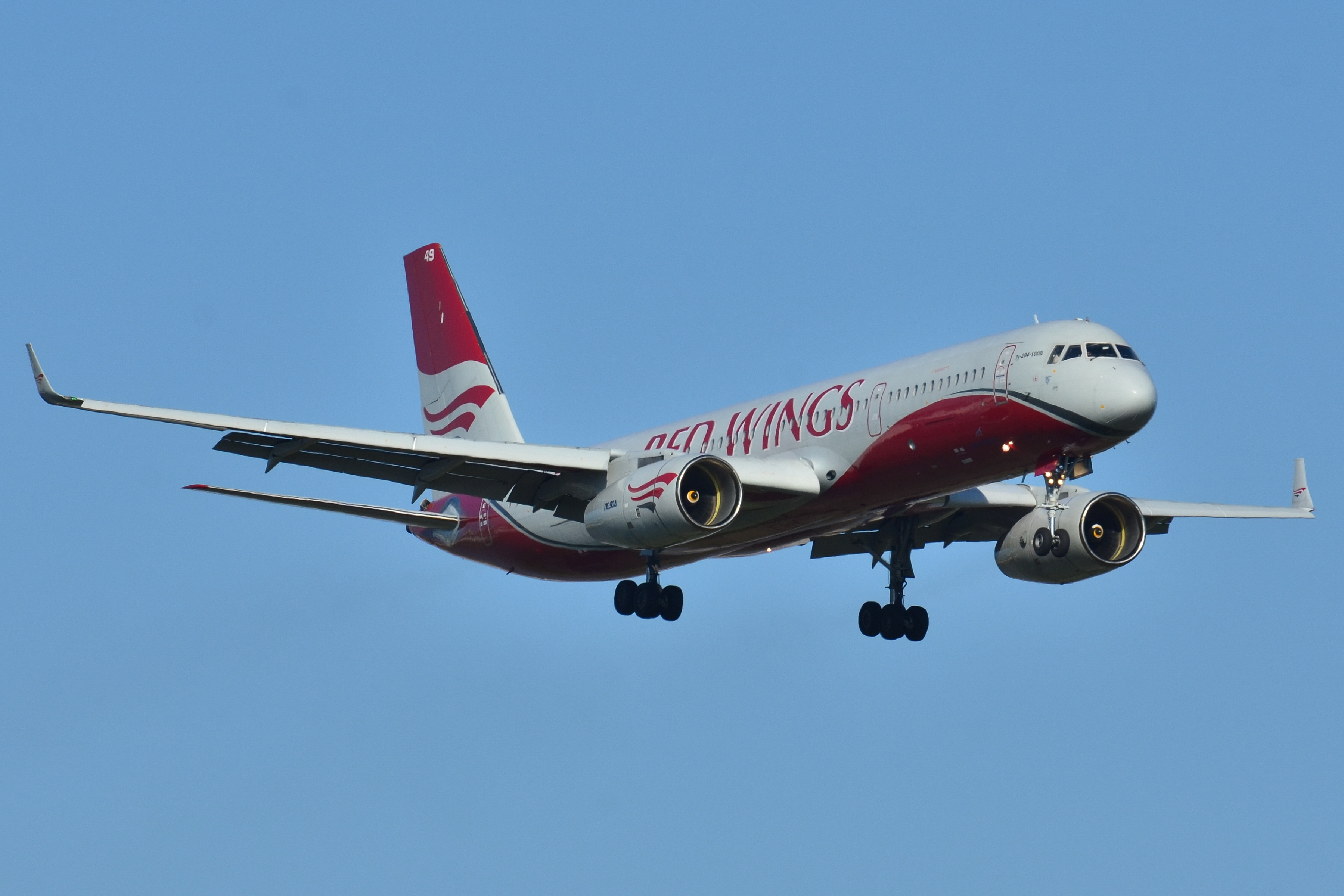 Photo prise à l'aéroport de Barcelone-El Prat (LEBL) en Espagne. Picture take at Barcelona-El Prat Airport (LEBL) in Spain.